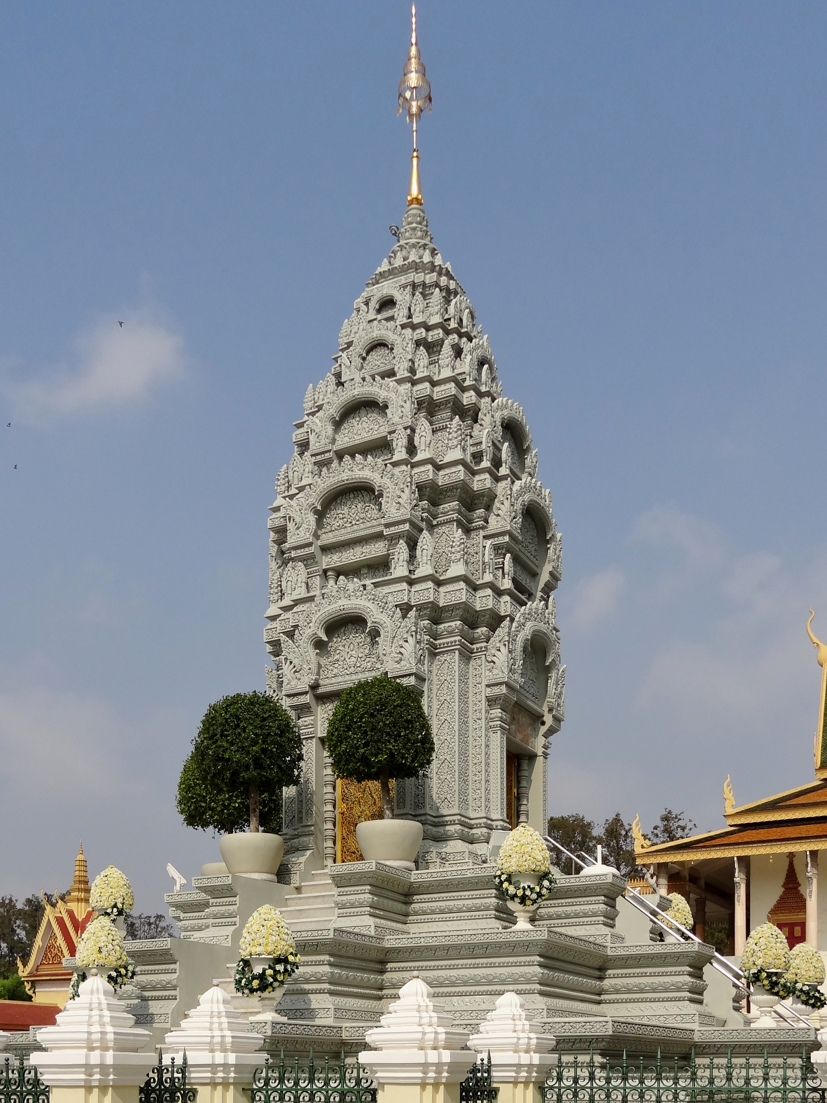 Stupa Kantha Bophas, der im Kindesalter verstorbenen Tochter König Norodom Sihanouks, vor der Silberpagode auf dem Gelände des Königspalasts von Phnom Penh, Kambodscha